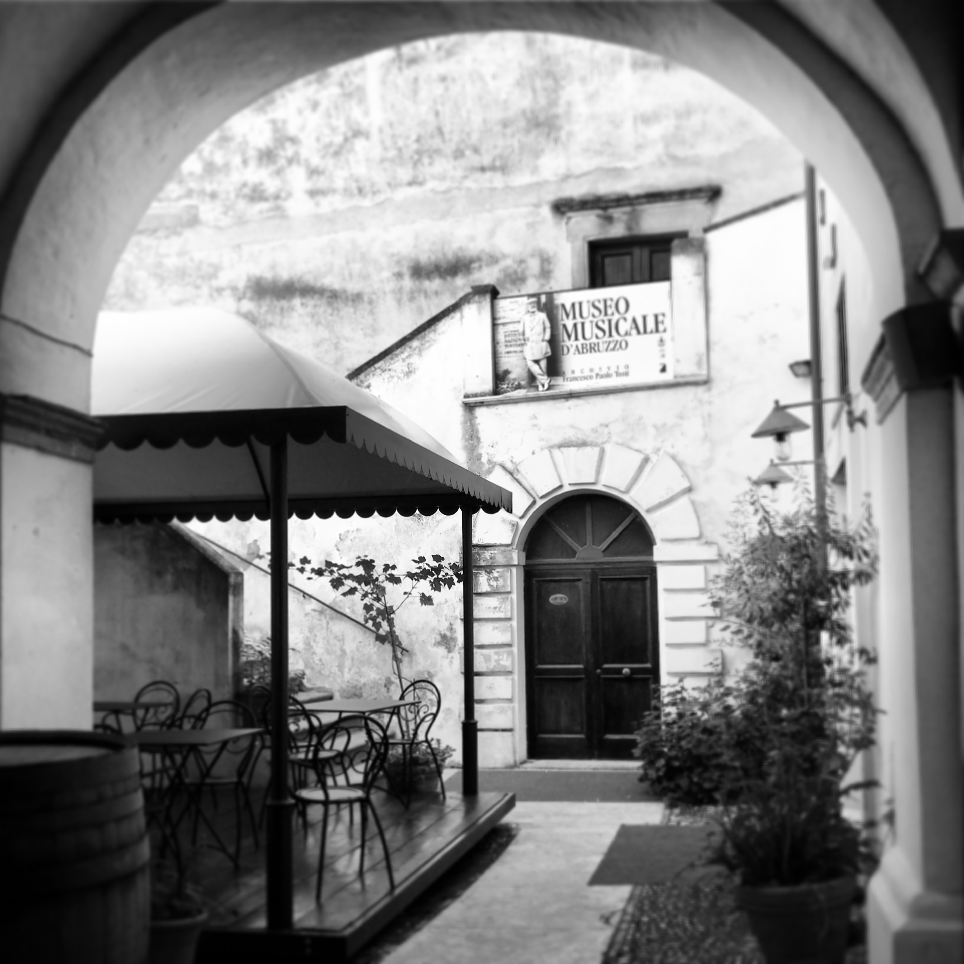 Interni dello storico palazzo Corvo. Ortona (CH) 2013